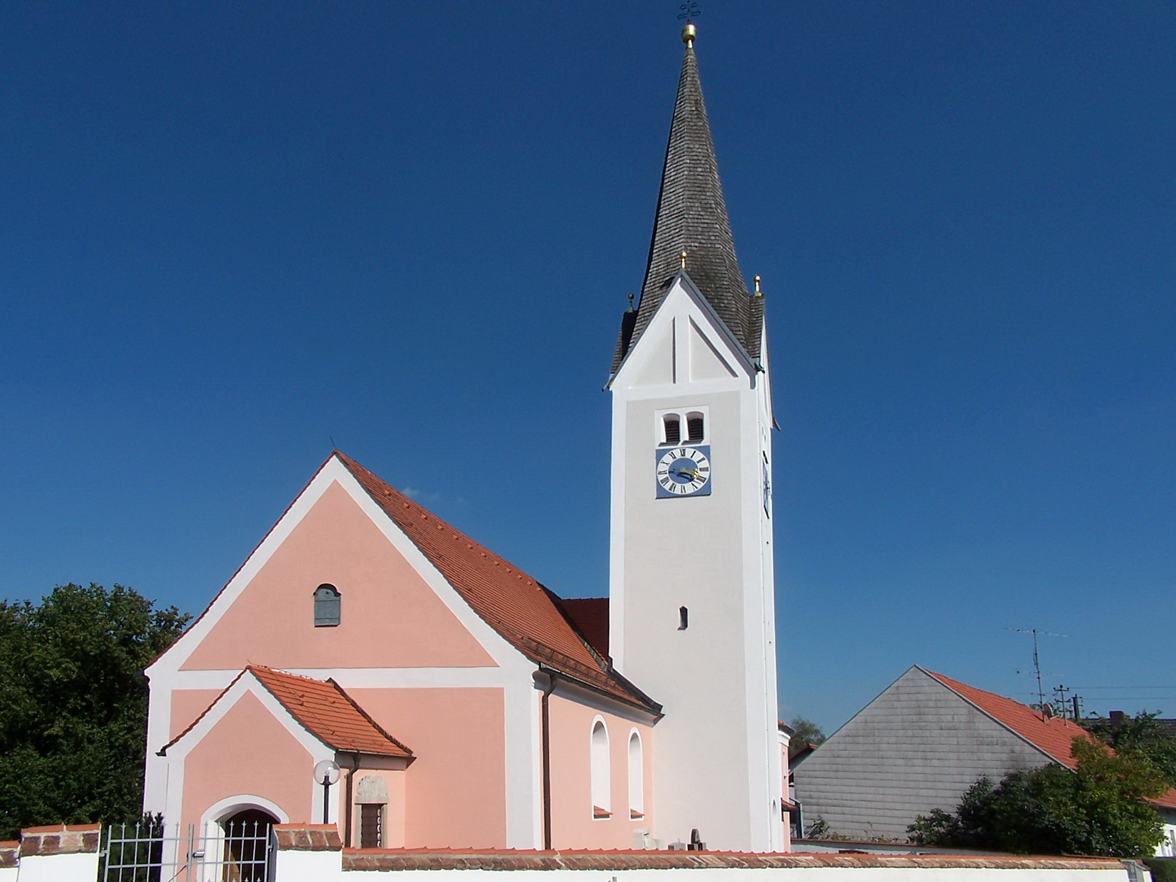 Herrngiersdorf, Pfarrkirche St. Martin. Katholische Kirche St. Martin, Saalkirche mit Satteldach und eingezogenem, fünfseitig geschlossenem Chor, Flankenturm mit Spitzhelm nach Süden, Langhaus und Turm romanisch, wohl 13. Jahrhundert, Chor spätgotisch, wohl 1505/06, barocker Ausbau um 1735/40, Spitzhelm von 1864; mit Ausstattung; Seelenkapelle, Steildachbau mit korbbogig abgeschlossener Vorhalle, wohl 1. Viertel 20. Jahrhundert.